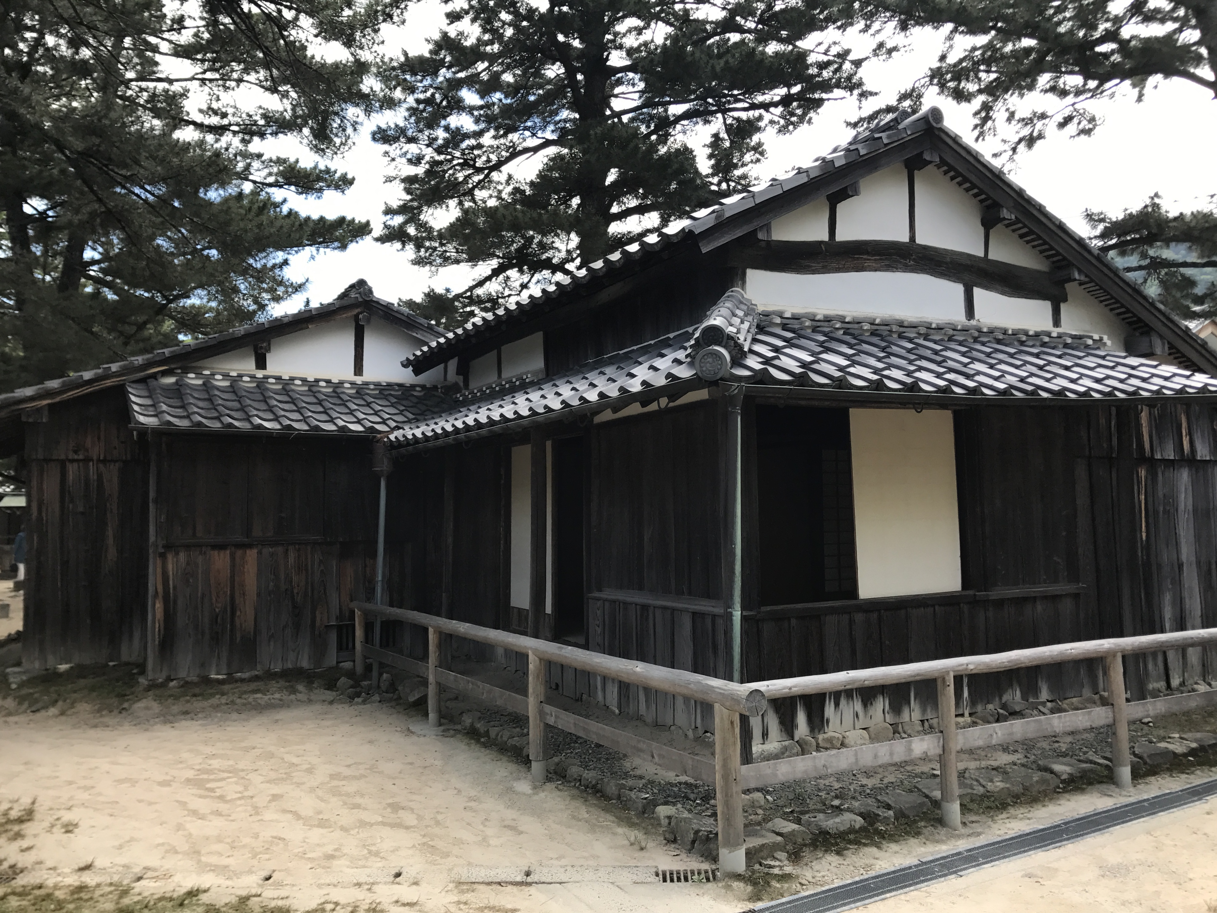 松陰神社・松下村塾